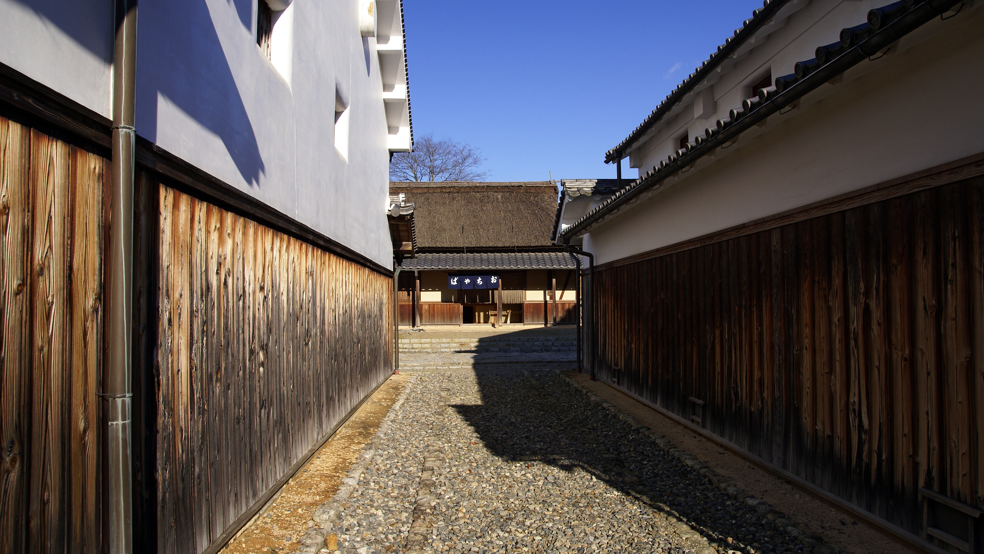 Ishibe-shukuba-no-sato in Konan, Shiga, Japan